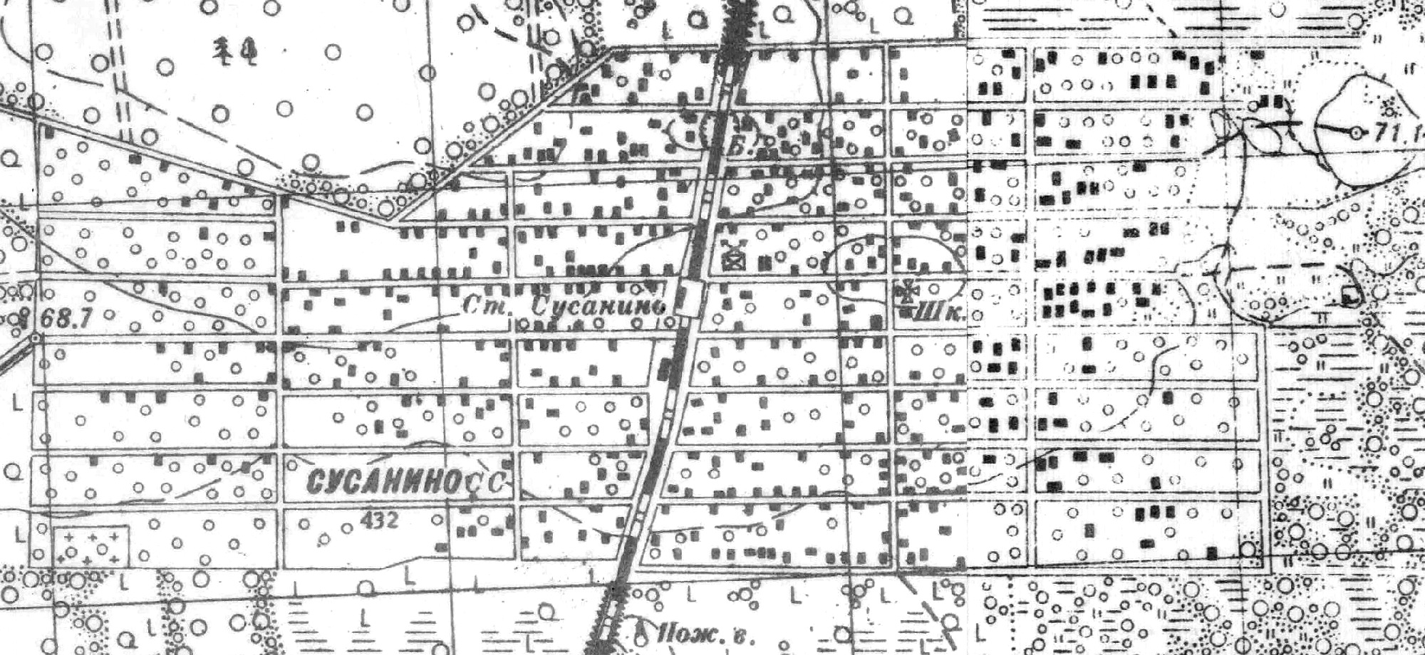 Топографическая карта Ленинградской области, квадрат О-36-13-Г-а, посёлок Сусанино